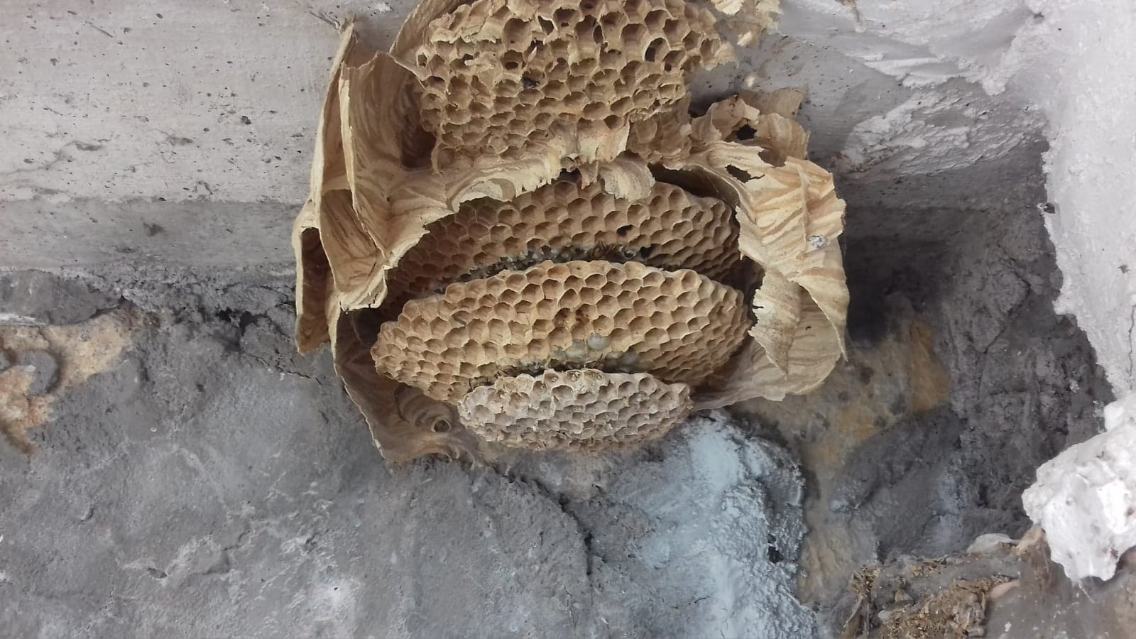 Nid de frelons dans une habitation (coffre pour volets roulants)